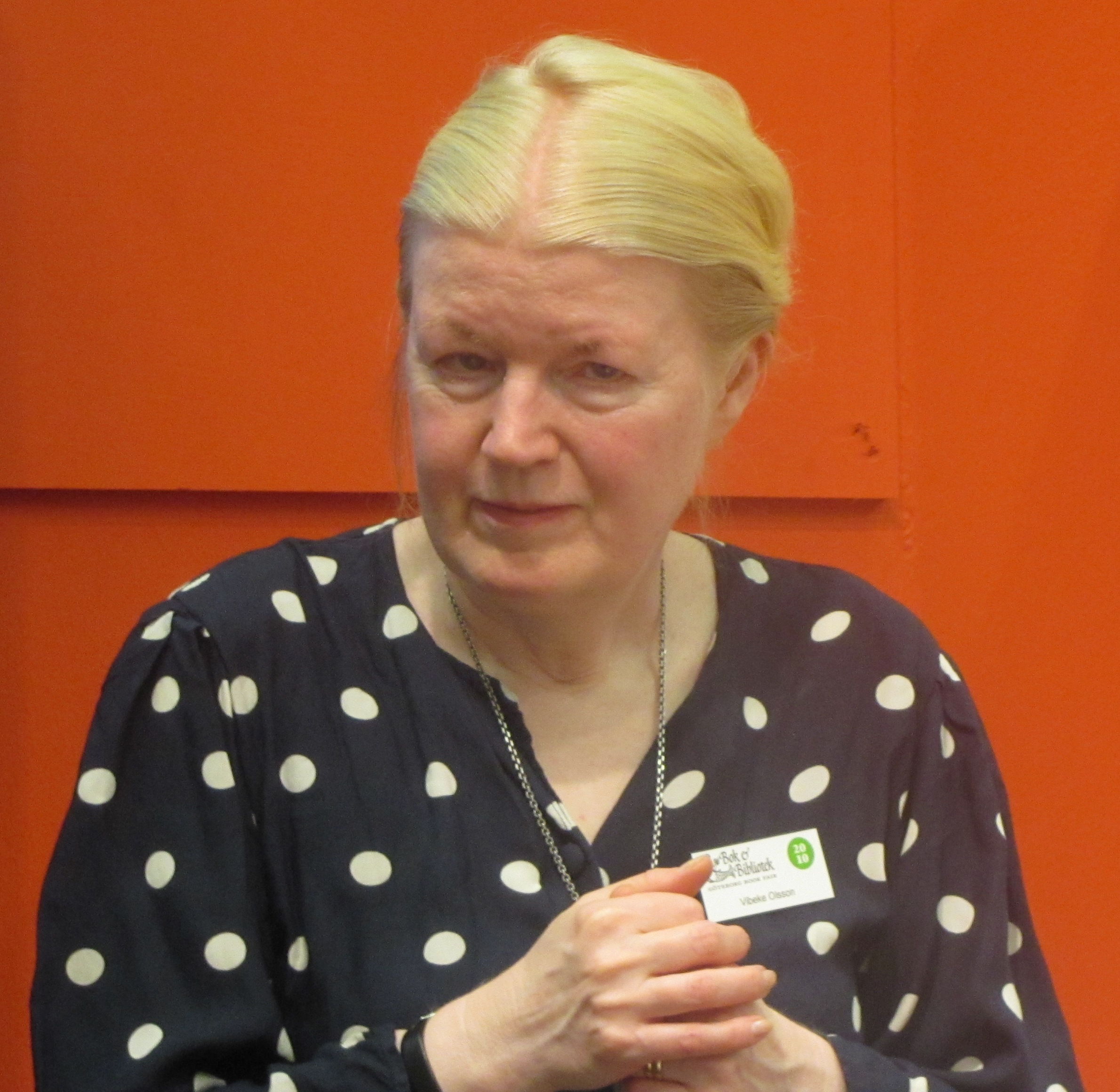 Författaren Vibeke Olsson på Bokmässan i Göteborg 2010.